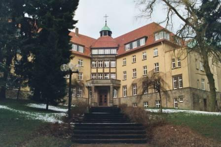 Clemens-Hofbauer-Kolleg, Clementinum Bad Driburg